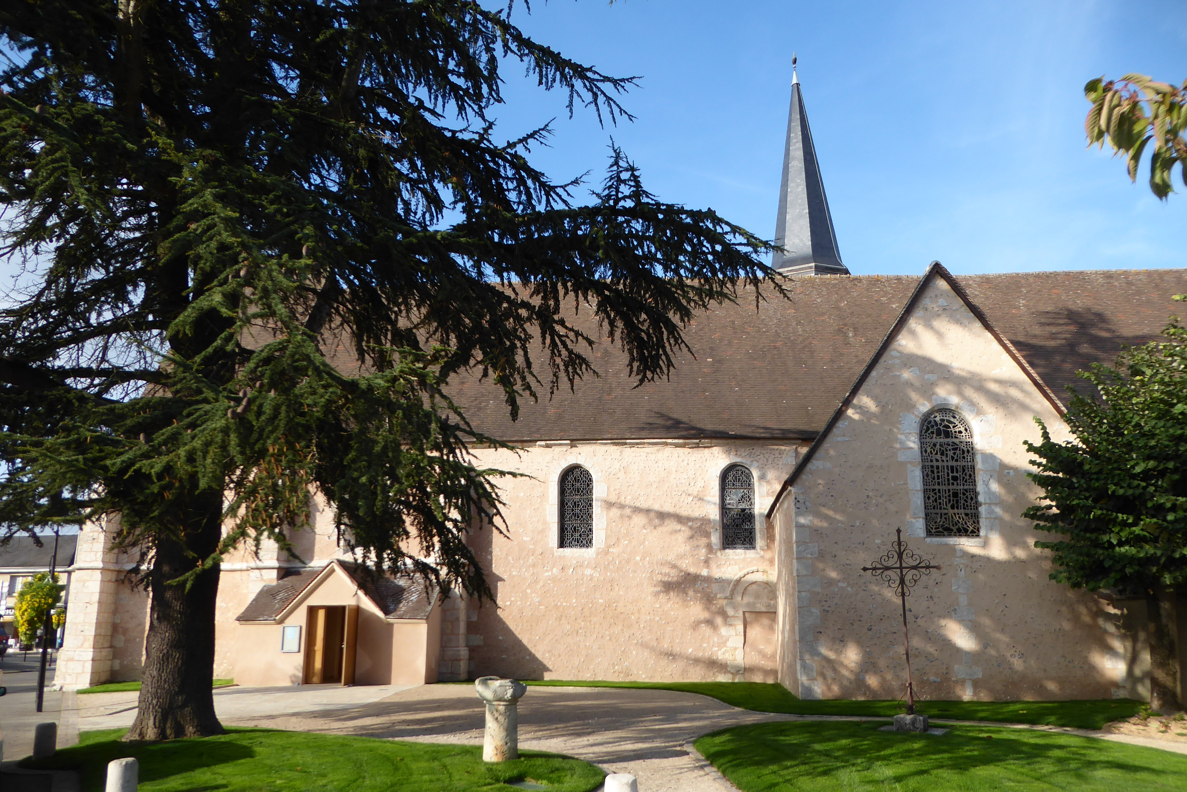 église Saint-Pantaléon, Lucé, Eure-et-Loir (France).